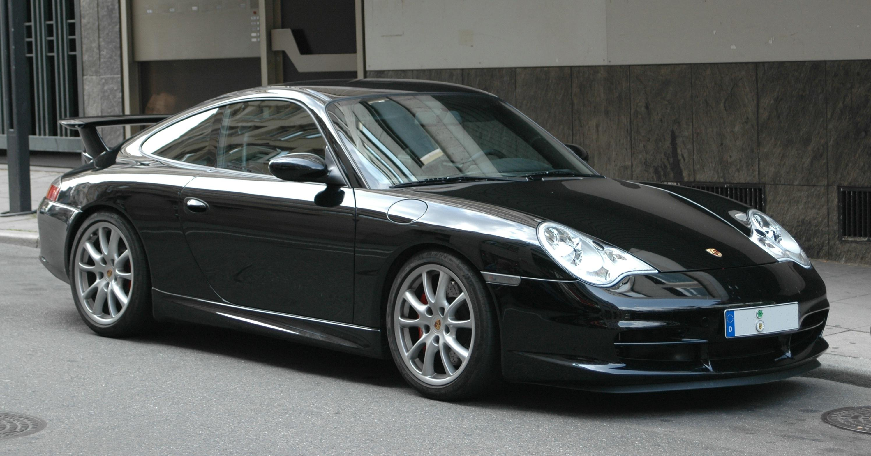 Porsche 911 GT3 996 (2003) black